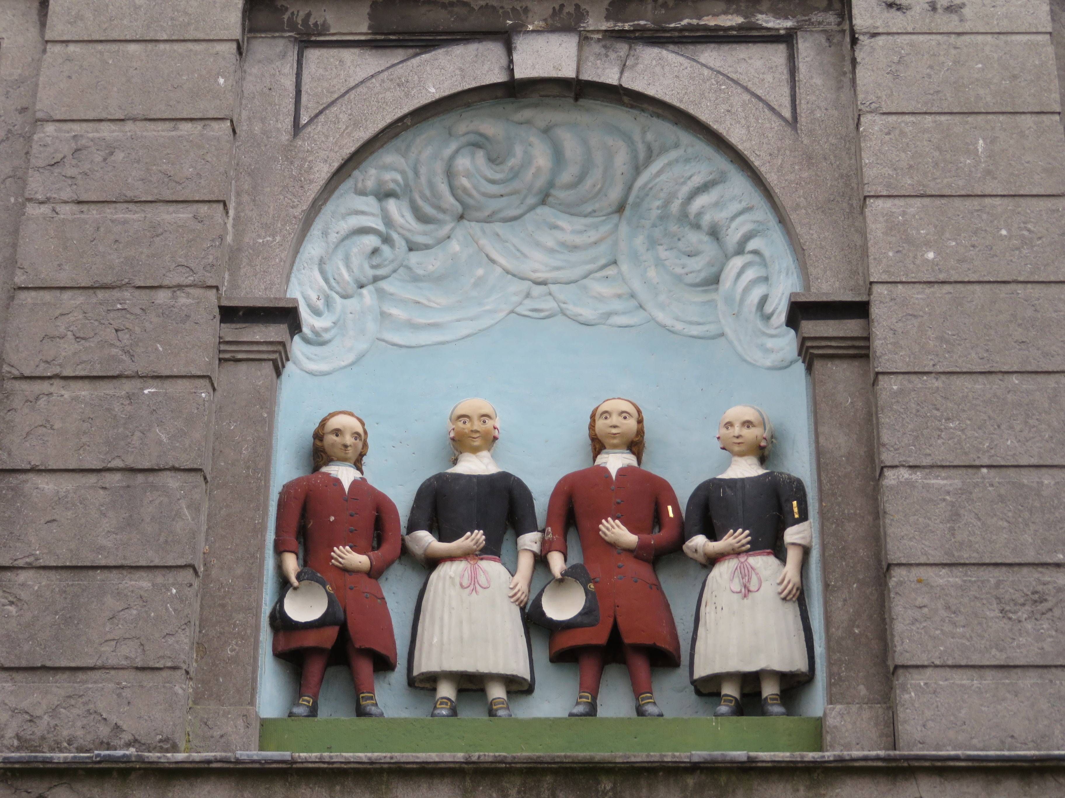 De Vier Weeskinderen boven de poort van het gelijknamige gereformeerde weeshuis uit 1765 aan de Torenstraat in Medemblik.